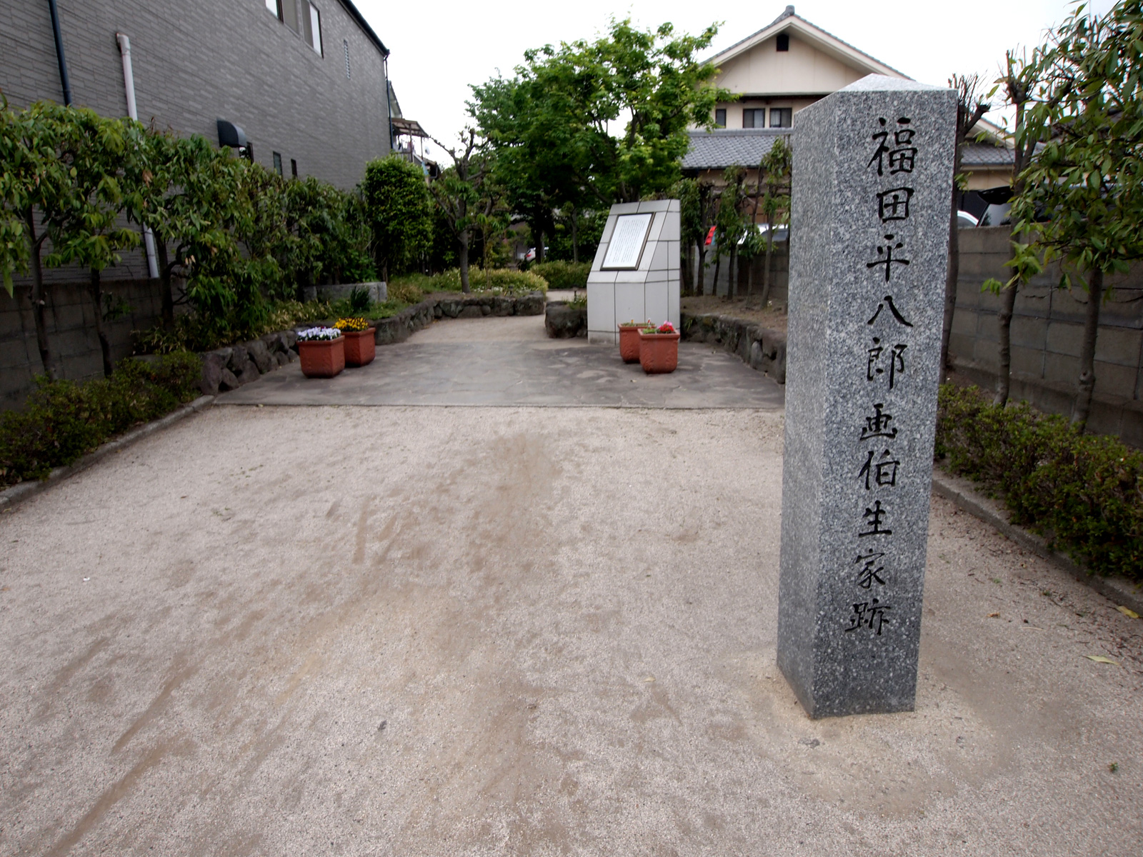 福田平八郎画伯生家跡（大分県大分市）